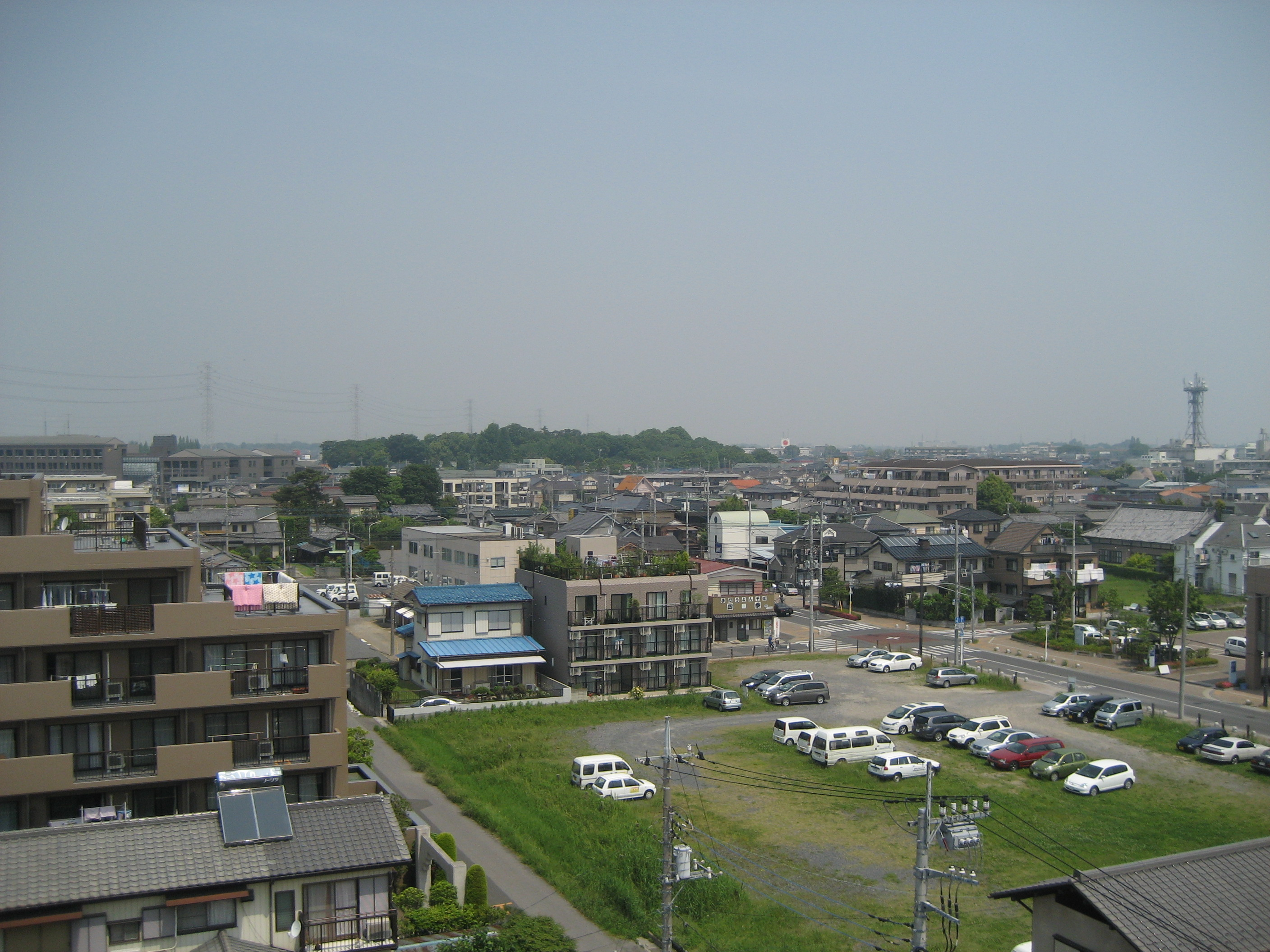 春日部市内内牧方面